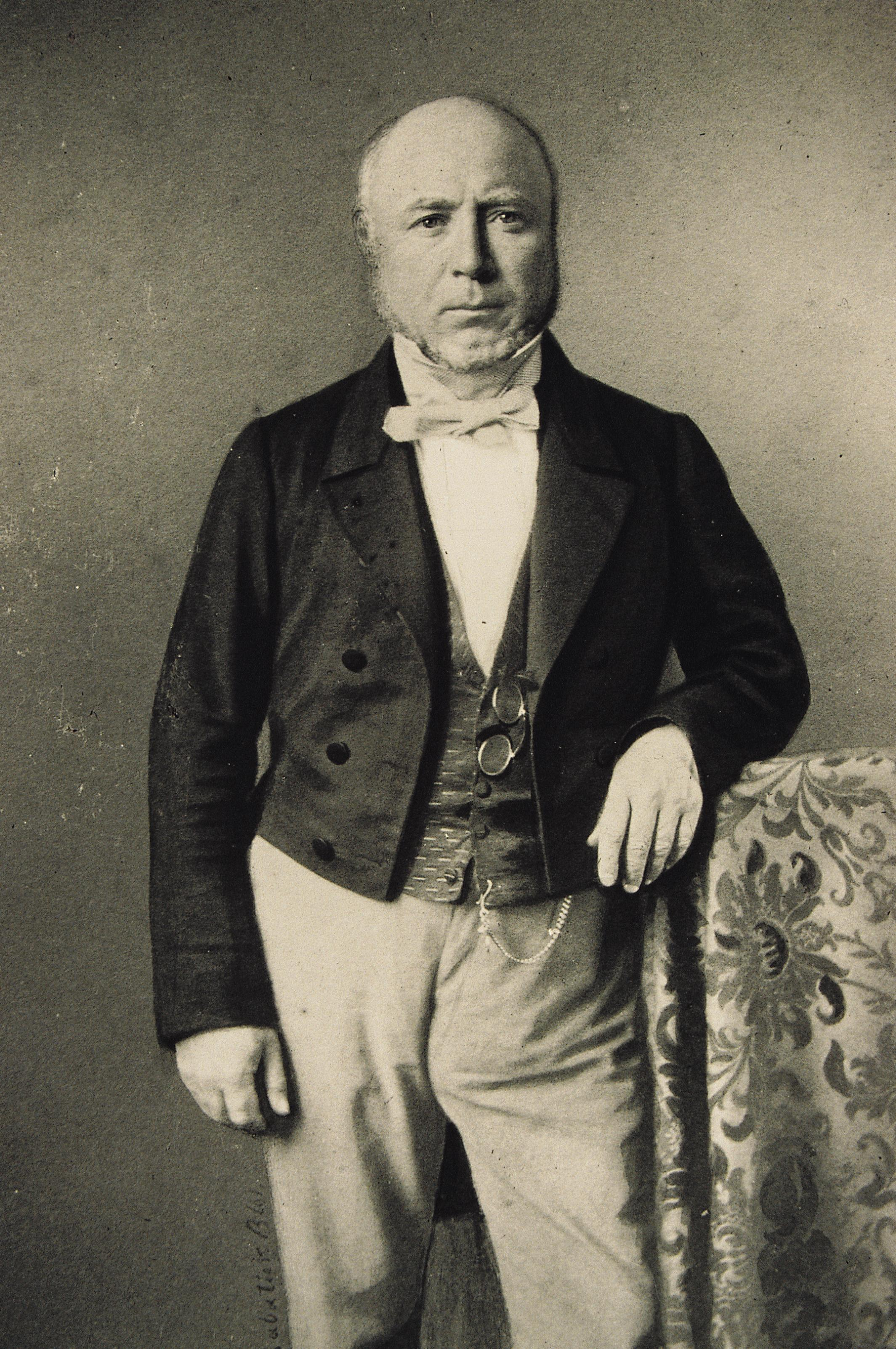 Paul-Emile Rémy Martin créateur de Louis XIII